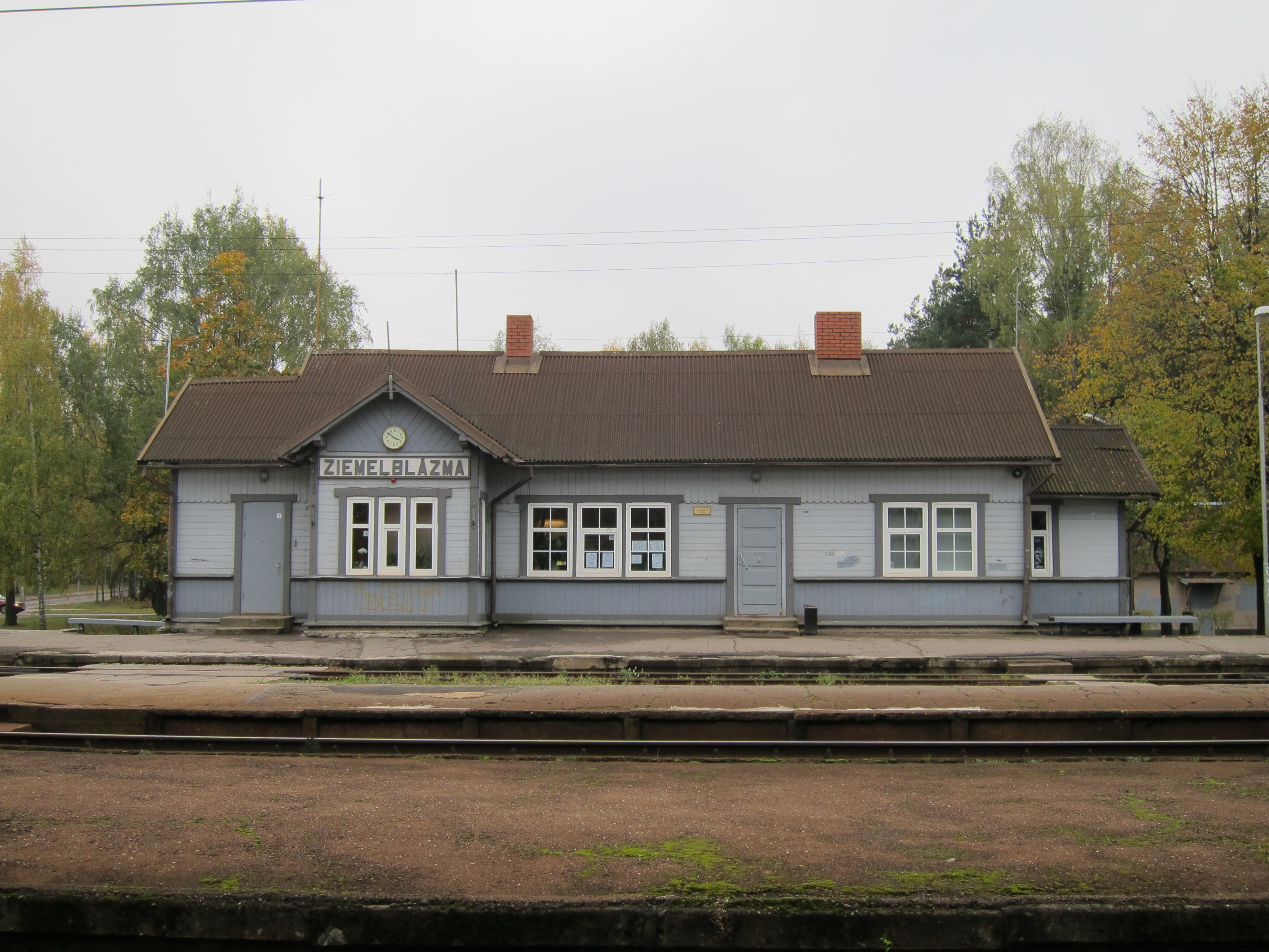 Ziemeļblāzmas stacijas ēka